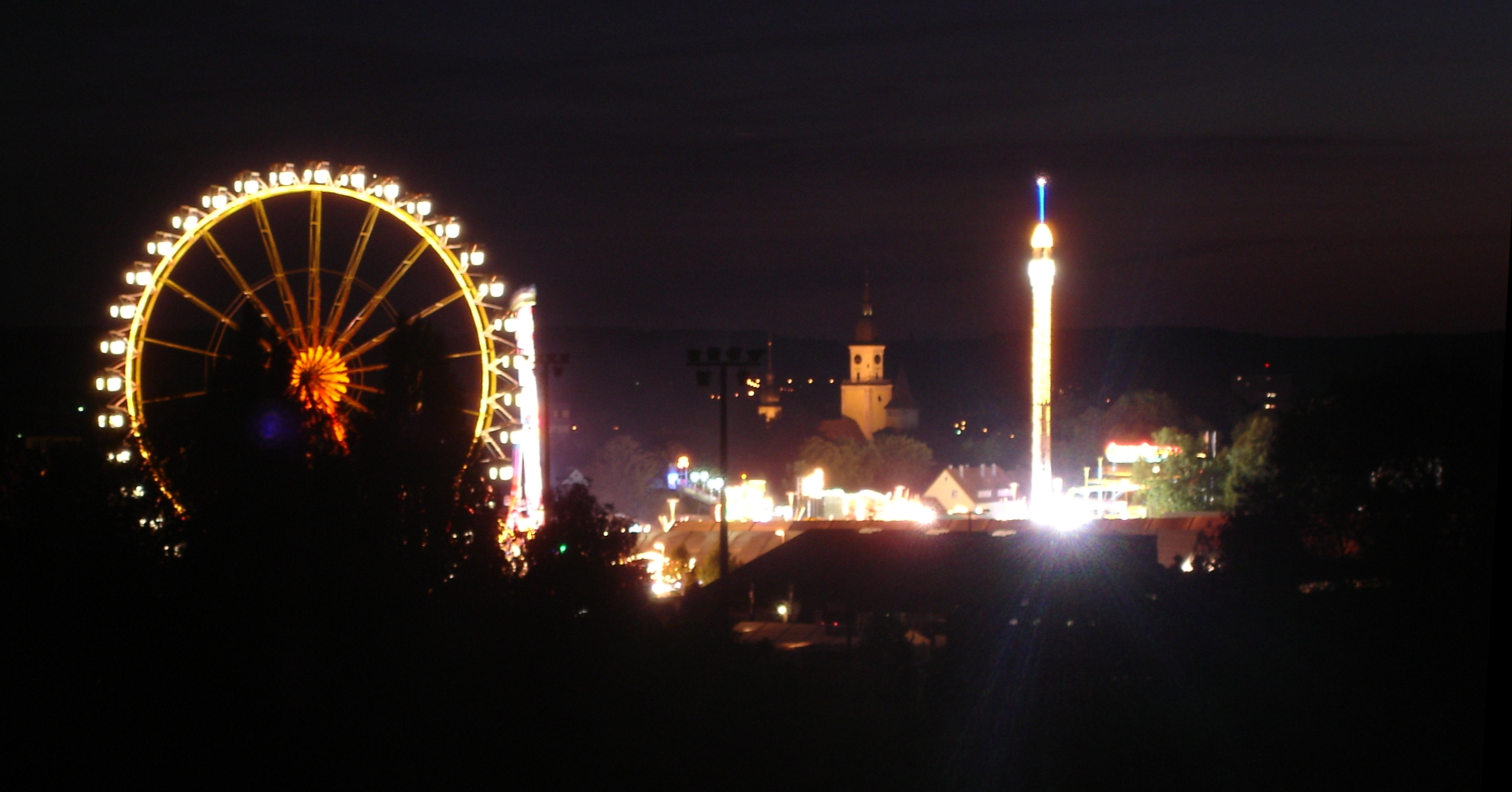 Der Festplatz des Fränkischen Volksfests 2005 kurz vor dem Feuerwerk vom Kreckelberg aus fotografiert.